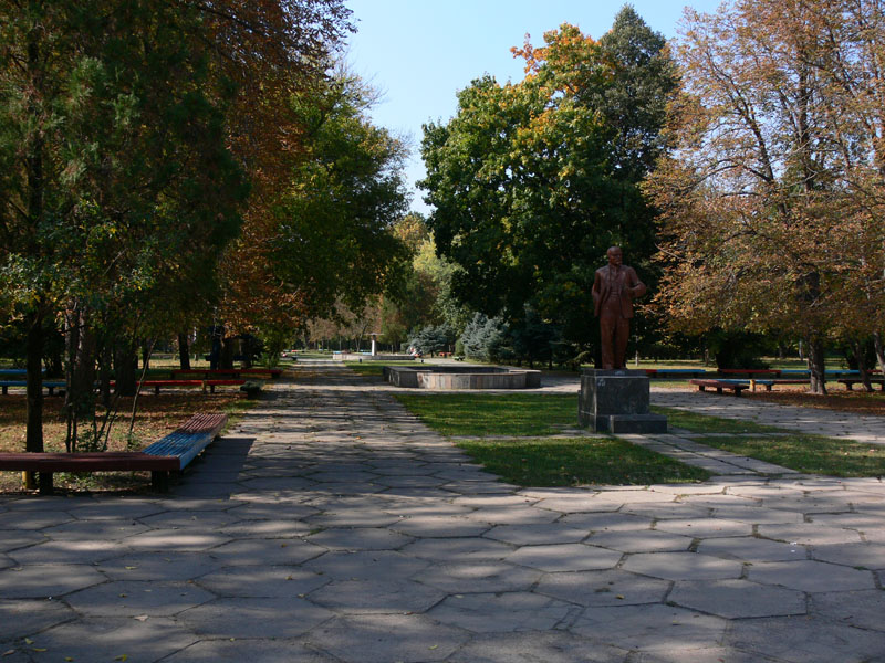 Парк Крюківського вагонобудівного заводу у місті Кременчук.